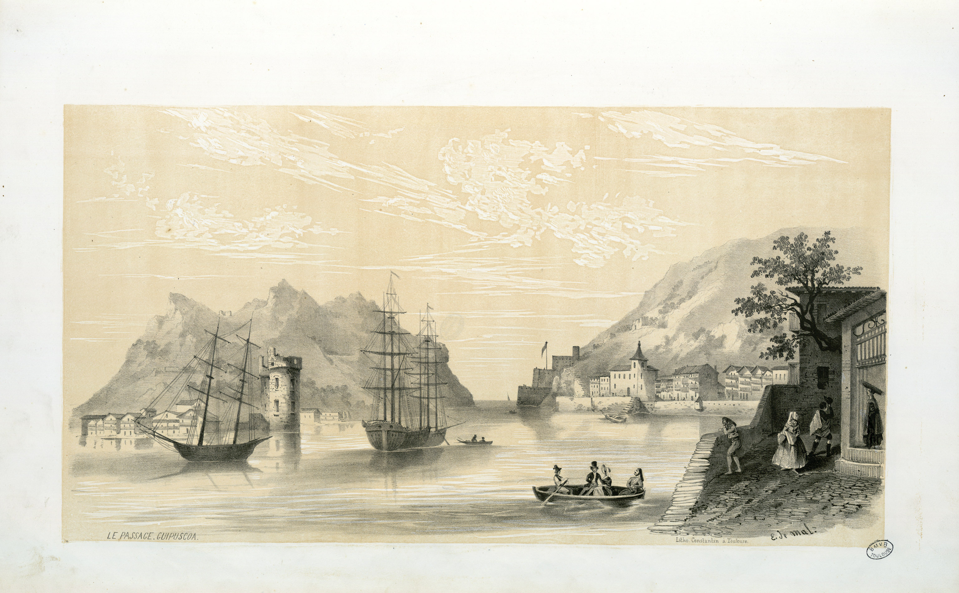 Fait partie d'un recueil de 15 planches lithographiées en camaïeu avec titre lithographié Ancely, René (1876 - 1966). Possesseur